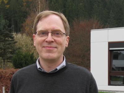 Foto di Ulrich Kohlenbach